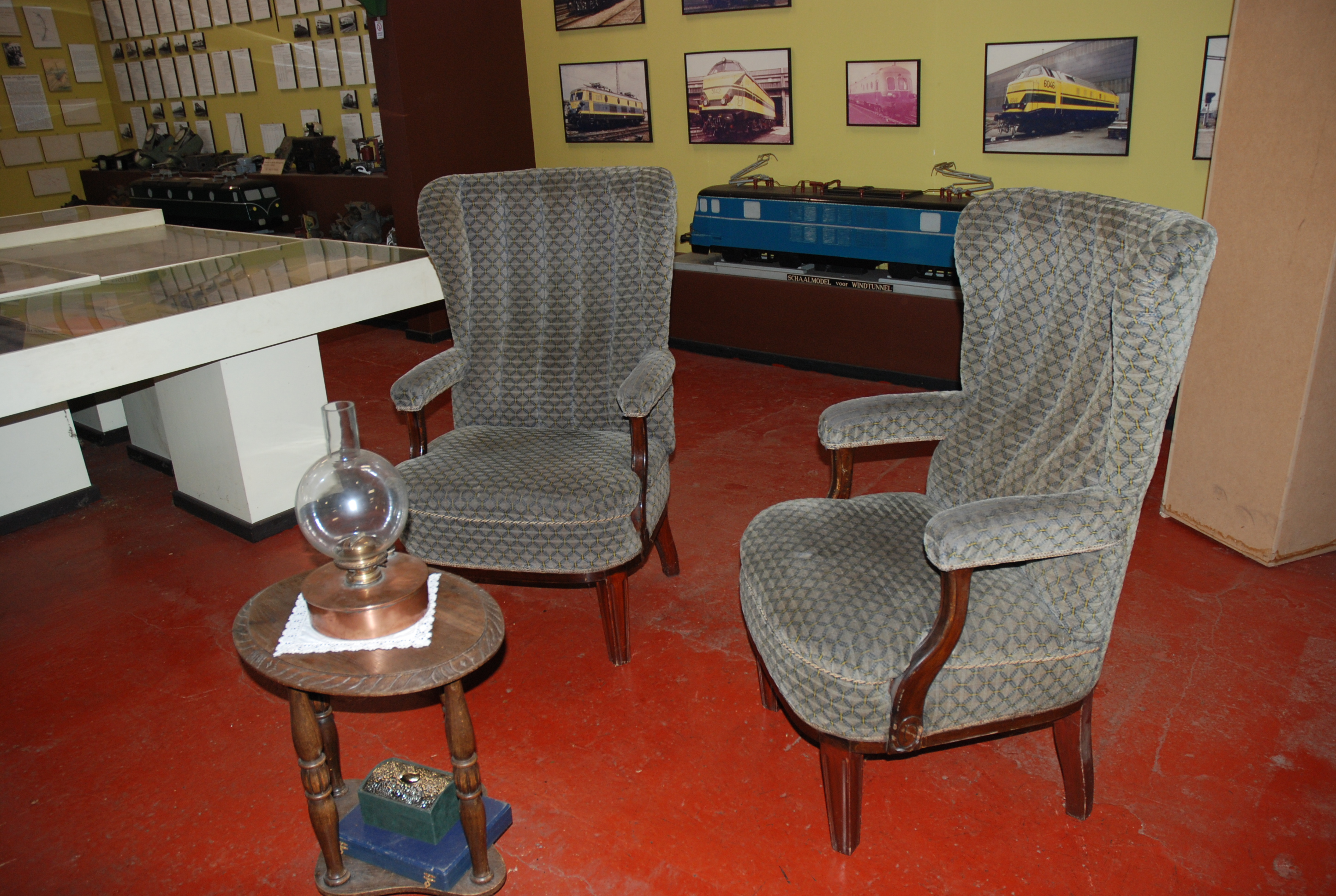 Zetels uit de Orient Express in het Spoorwegmuseum de Mijlpaal te Mechelen (België)